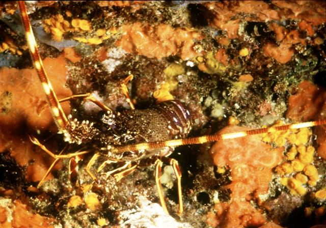 Area Marina Protetta Capo Gallo, Palermo, Sicily Palinurus elephas